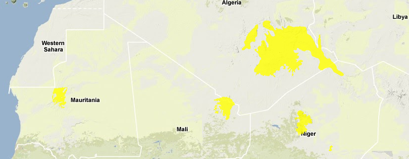 Mappa Ecoregione PA1332 - Boschi xerofili montani del Sahara occidentale